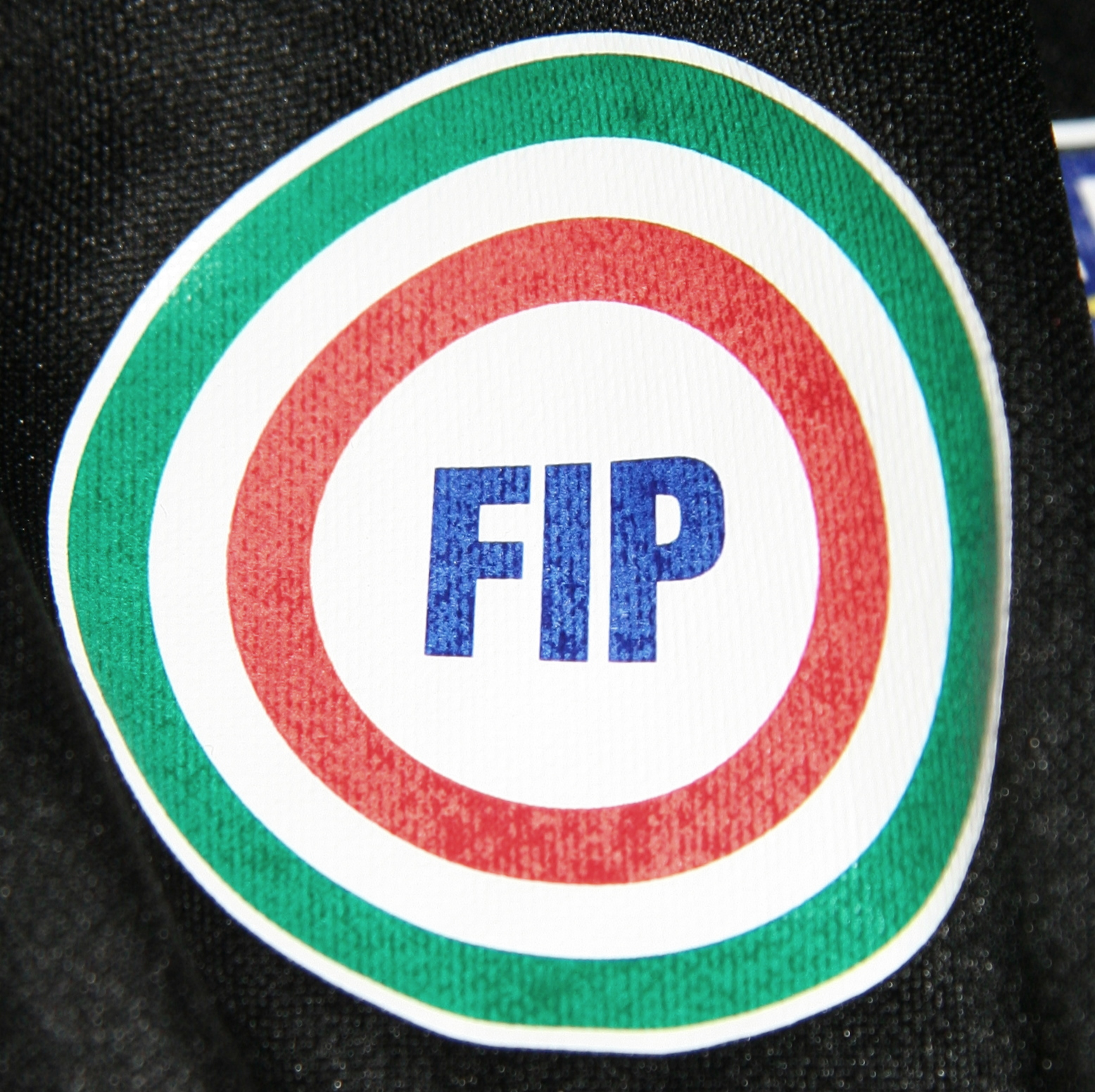 Logo della Coppa Italia di Basket ricavato dalla maglietta della Germano Zama Faenza durante una partita